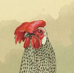 Bergische Schlotterkämme. Gallus dom. montensis.